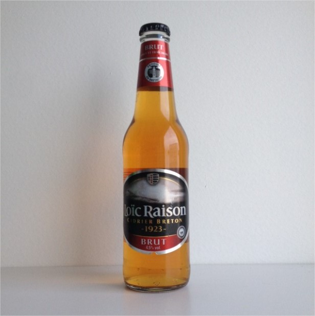 bouteille Loïc Raison (Agrial)